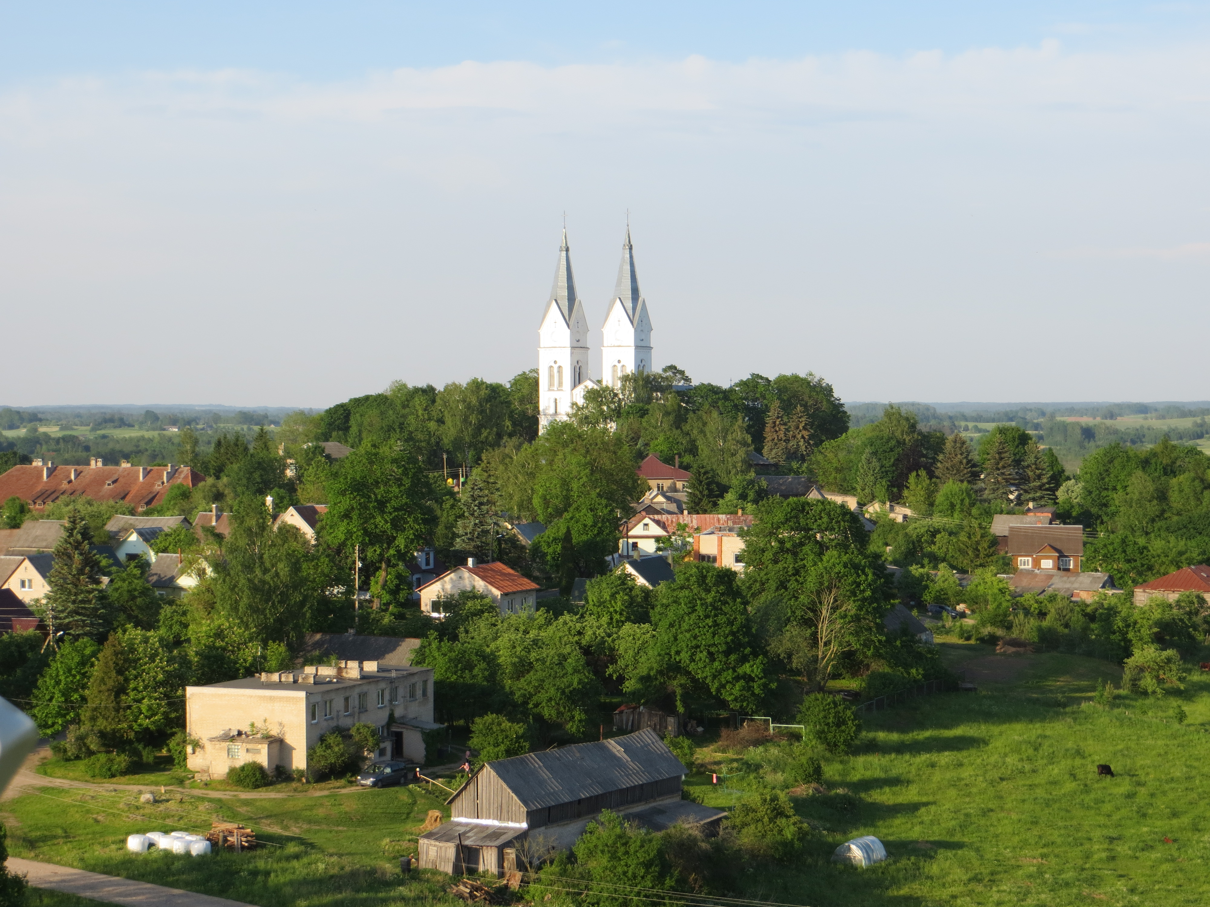 Alanta, Lithuania